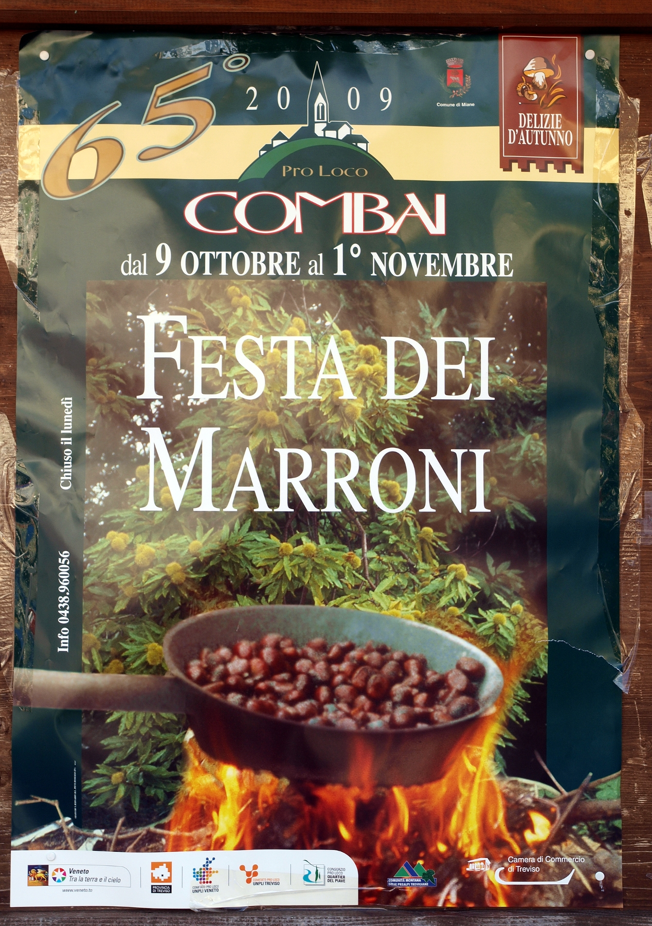 Manifesto della Festa dei Marroni di Combai, Miane, Veneto, Italia.